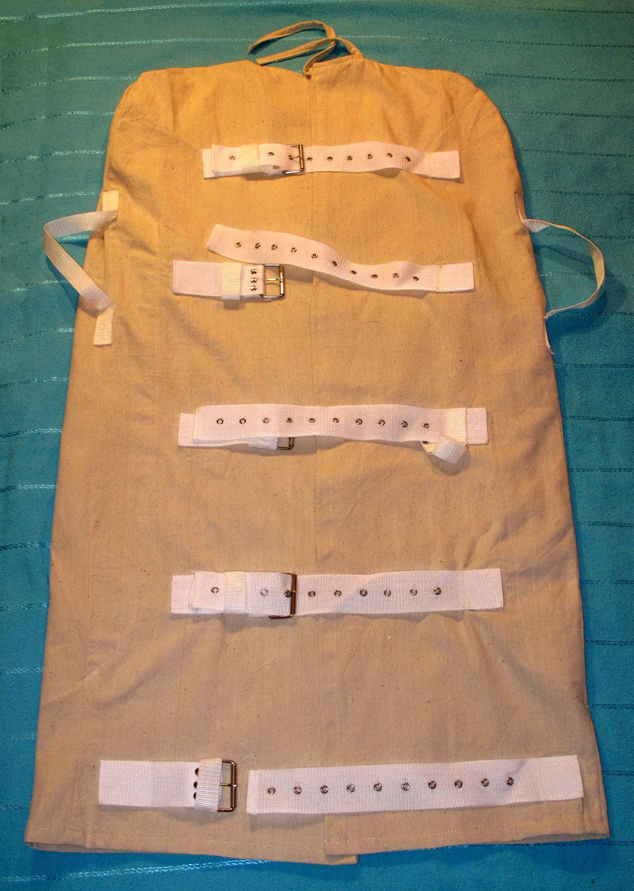 Безрукавная медицинская смирительная рубашка средней длины.